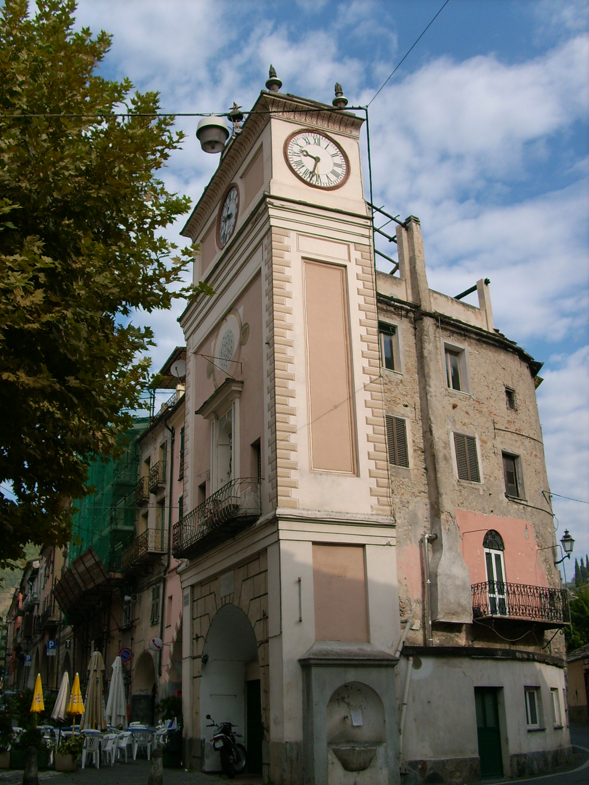 Torre di Pieve di Teco, Liguria, Italia